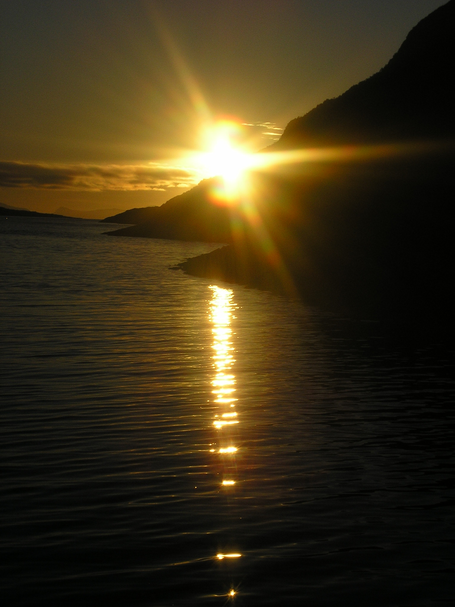 Taken by Øyvind Kind Robertsen (me).